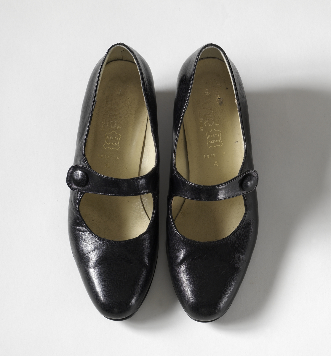 Ett par svarta damskor i skinn med slejf.